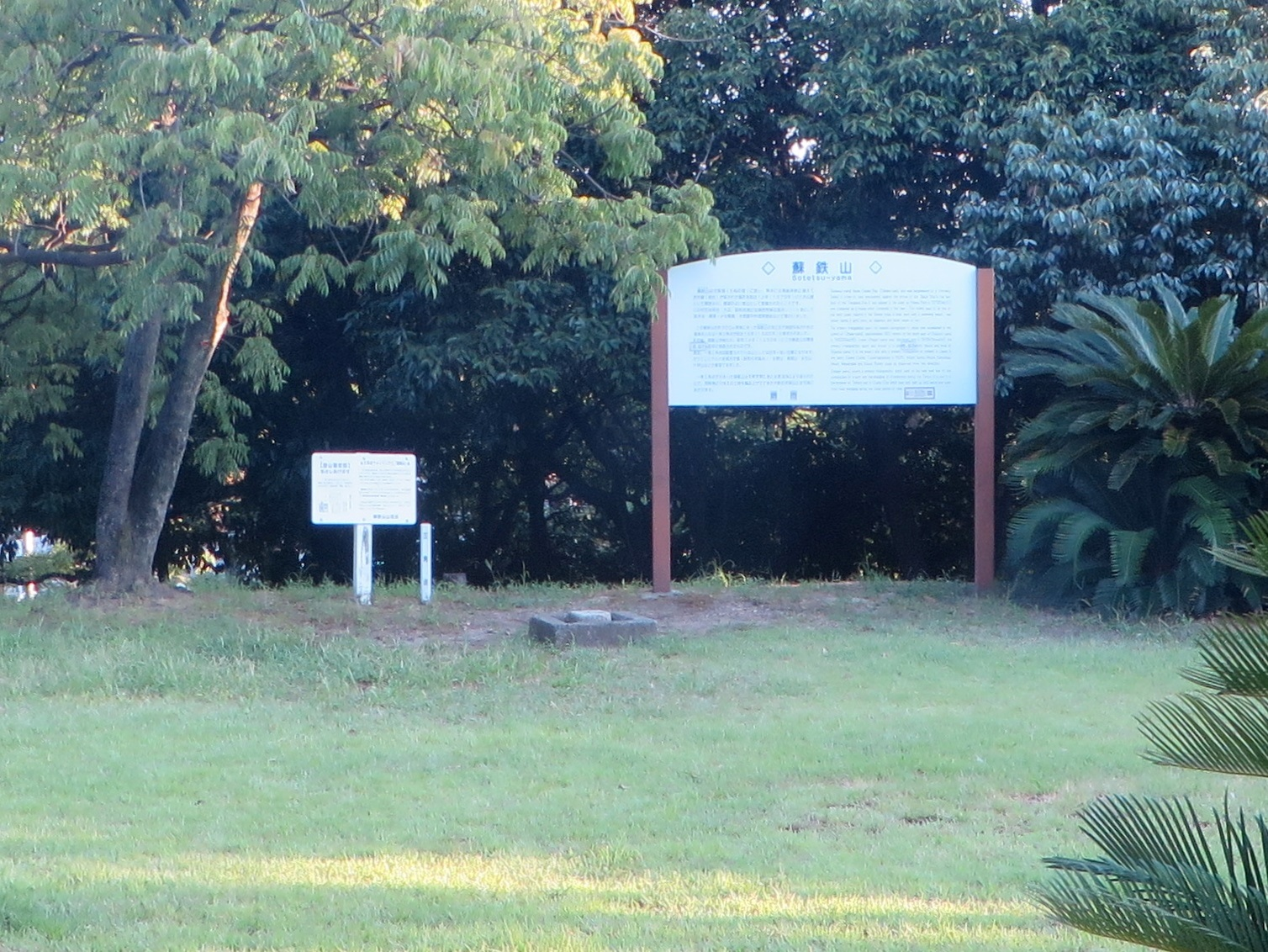 蘇鉄山山頂 ソテツが植えられている